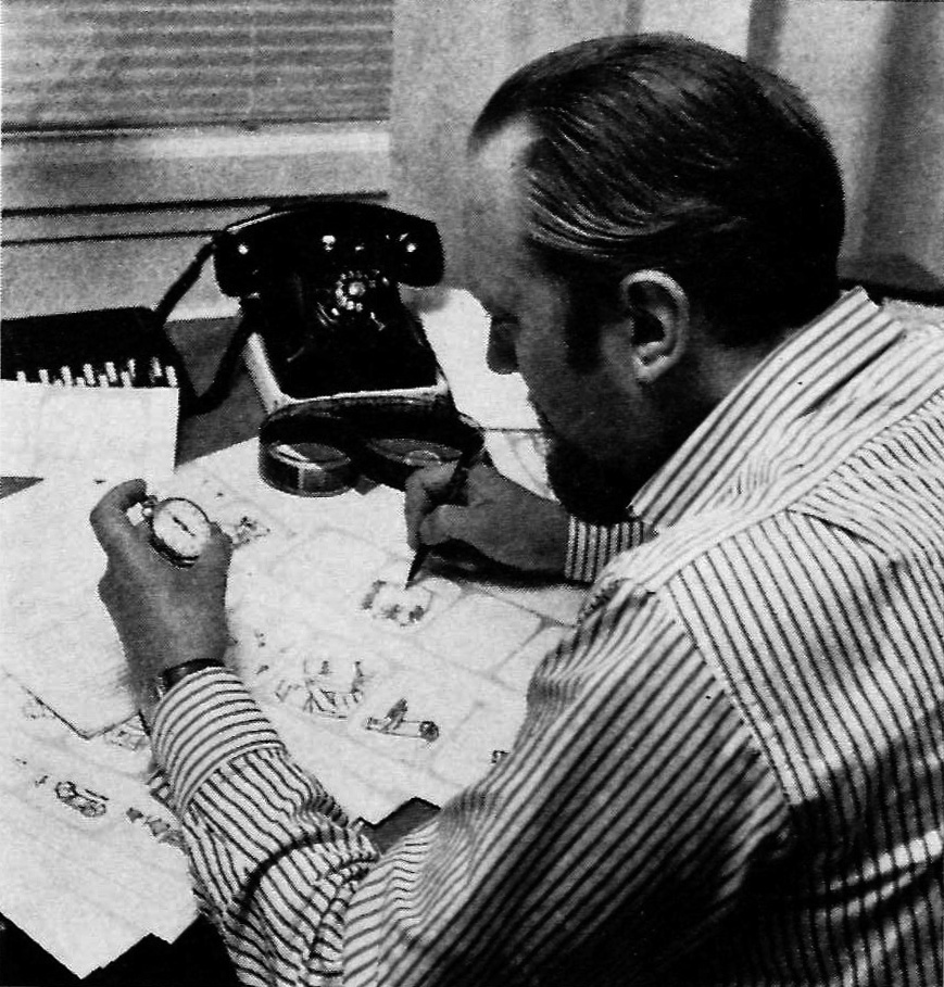 Filmtecknaren Stig Lasseby, fotograferad i Team Films ateljéer.